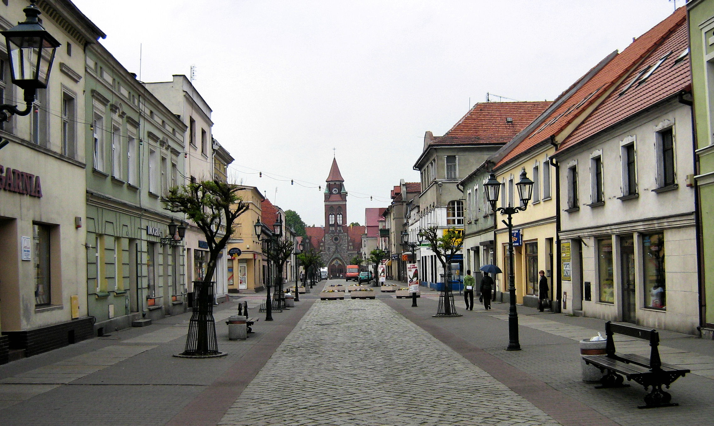 Ulica Szeroka w Grodzisku Wielkopolskim